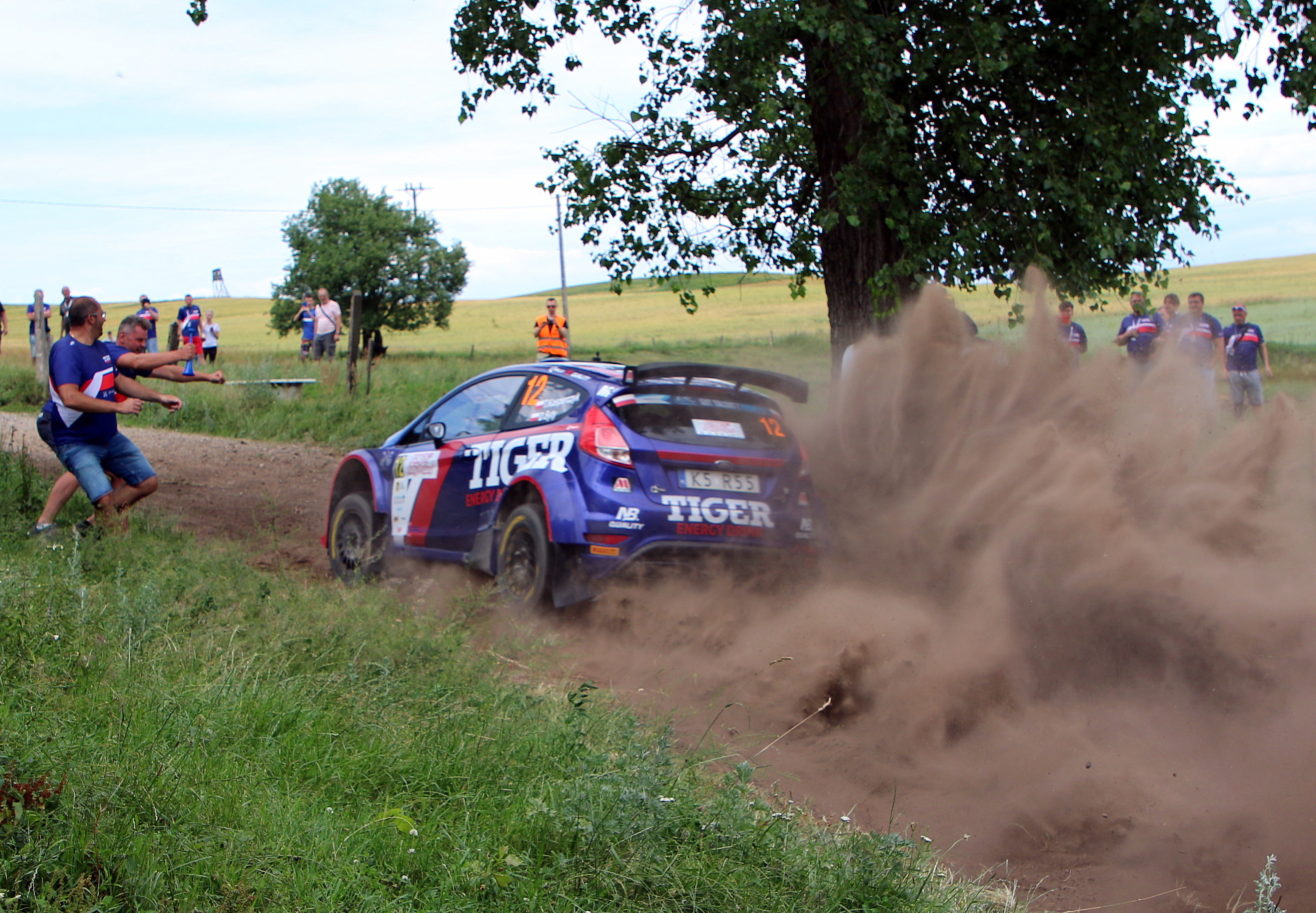 Tomasz Kasperczyk i Damian Syty podczas Rajdu Polski 2019